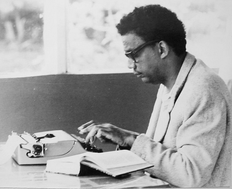 L'historien Roger Gaillard au travail dans sa résidence de Kenskoff en 1973 (photo Maxime Gaillard).